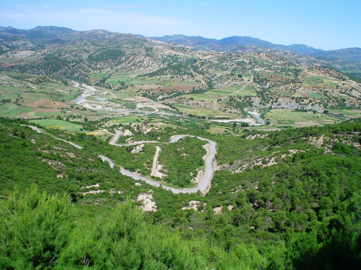 Oued Isser pres de tablat